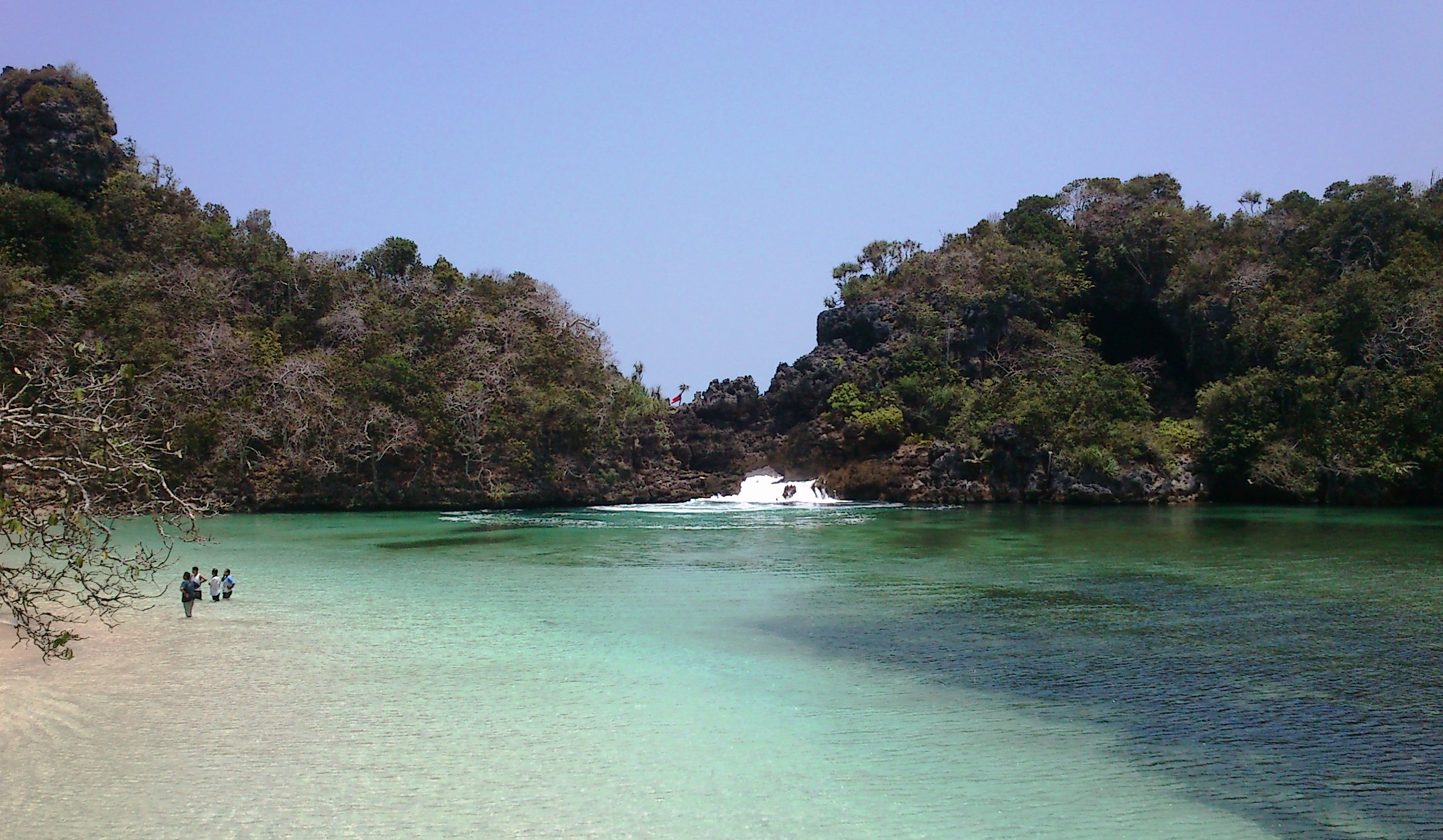 Segara anakan di Pulau Sempu, Malang, Jawa Timur.